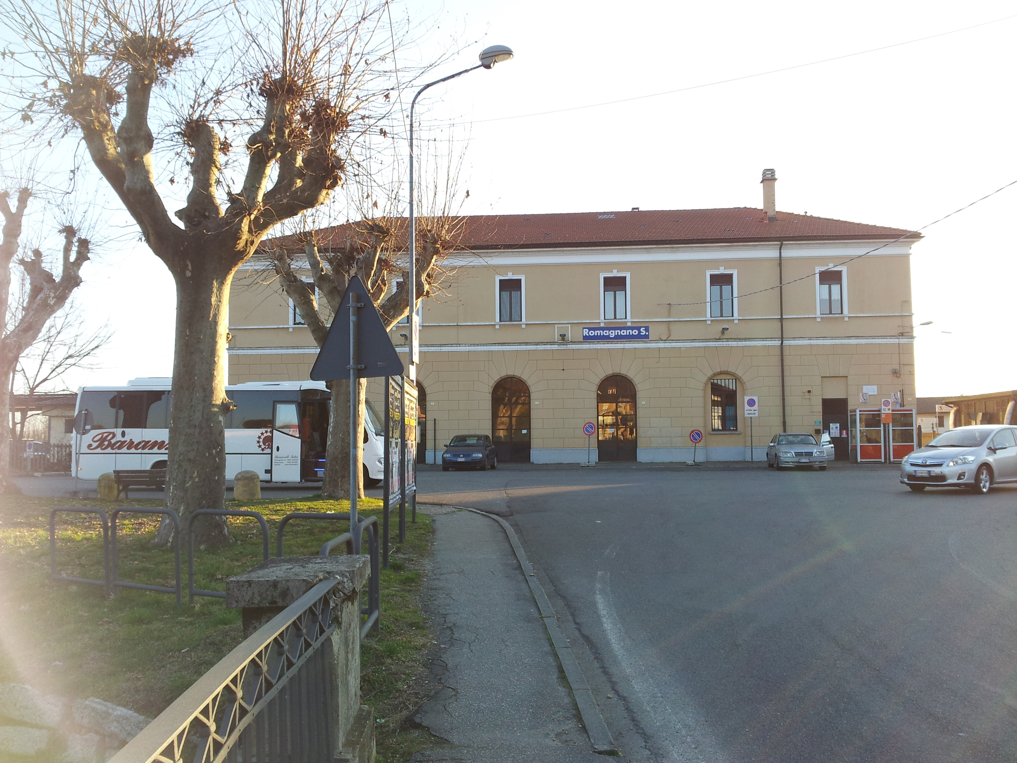 Stazione lato strada